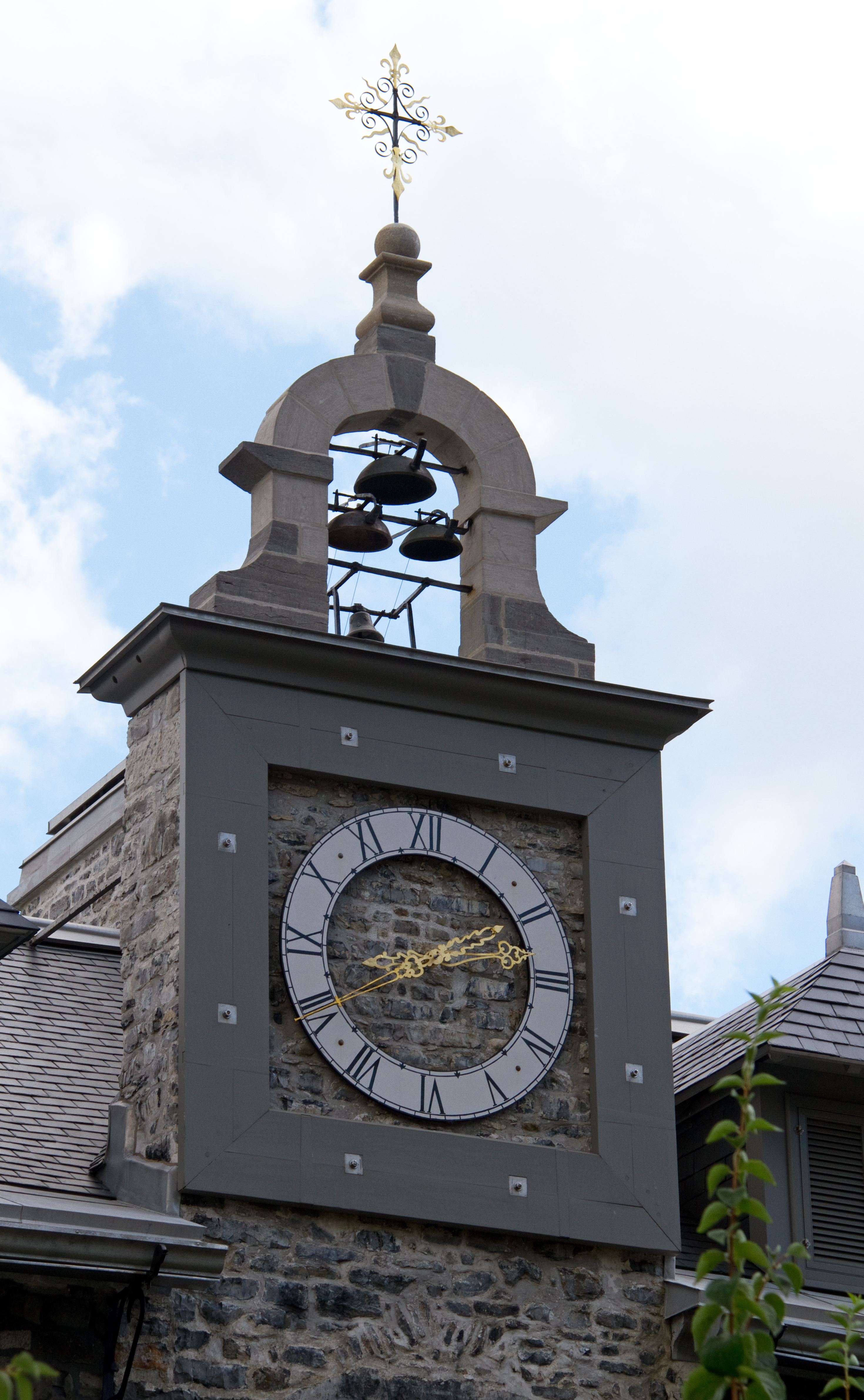 Montreal 19